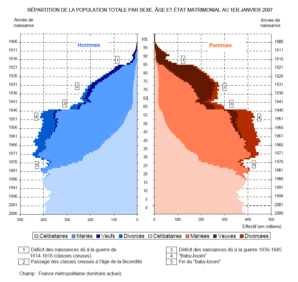 RÉPARTITION DE LA POPULATION TOTALE PAR SEXE, ÂGE ET ÉTAT MATRIMONIAL AU 1ER JANVIER 2007